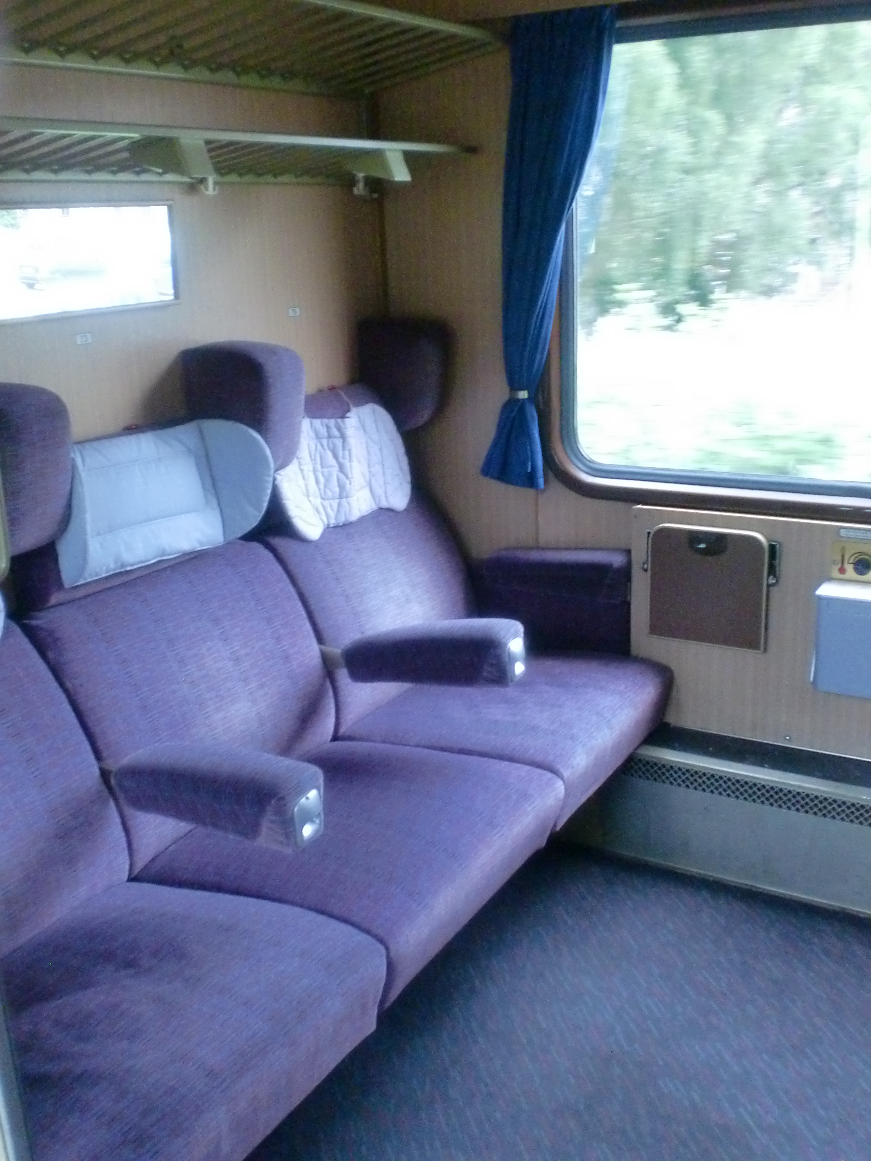 Abteil Nummer 7 im Bwmz111, IC 2287